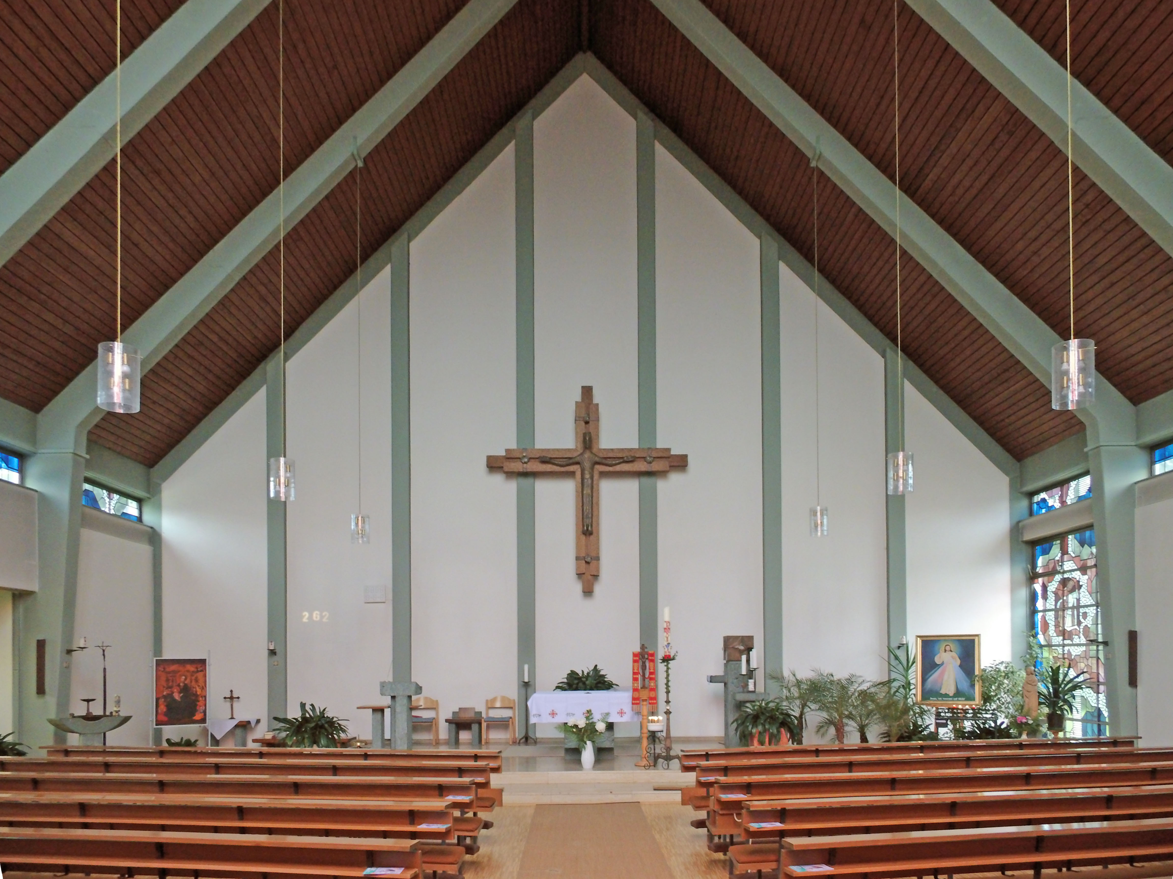 Katholische Kirche in Wittingen (Landkreis Gifhorn)